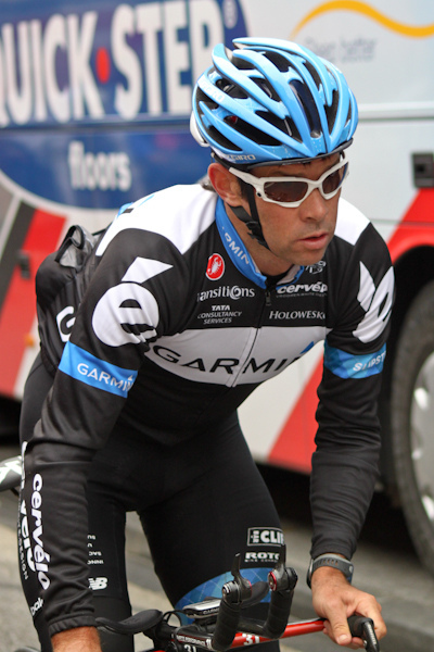 Prologue du Critérium du Dauphiné 2011, Saint Jean de Maurienne